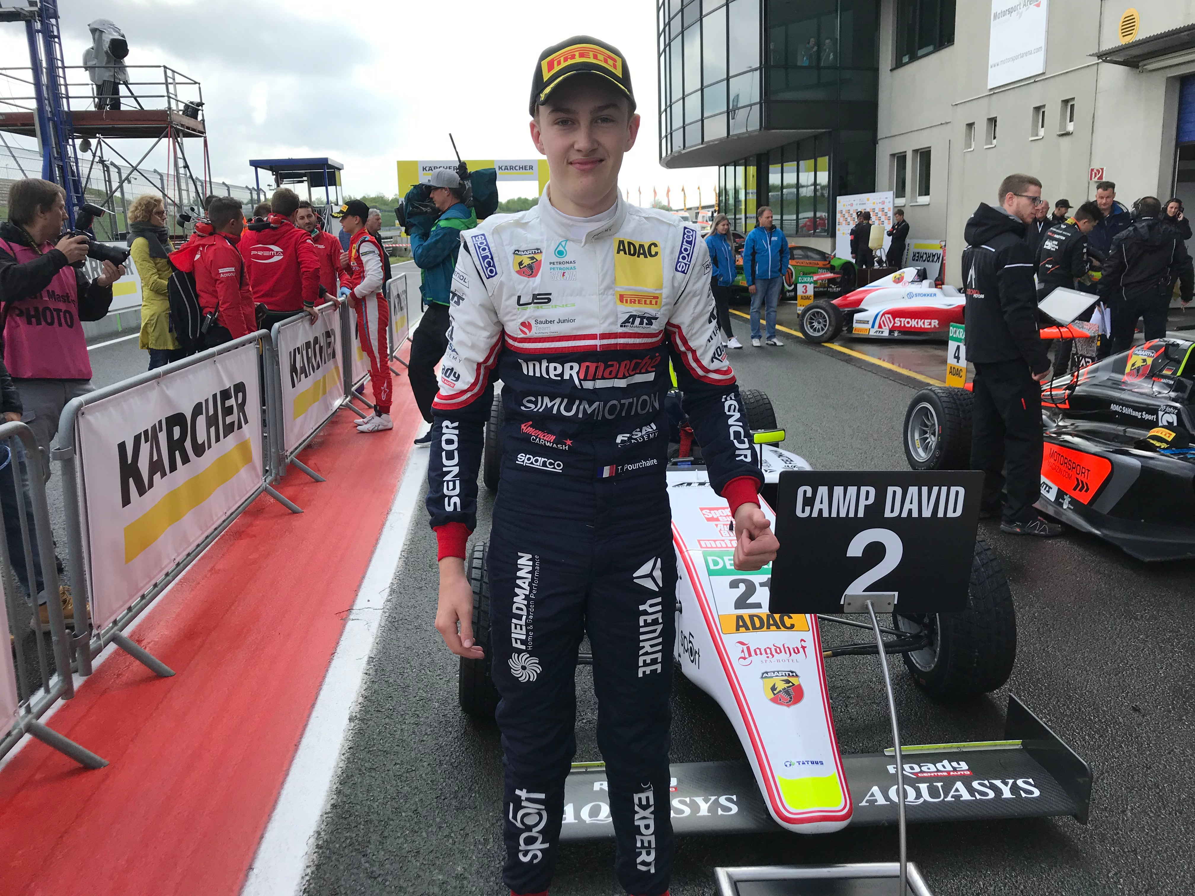 Théo Pourchaire, à l'arrivée de la course 2 d'Oschersleben en championnat d'Allemagne de Formule 4 en 2019.